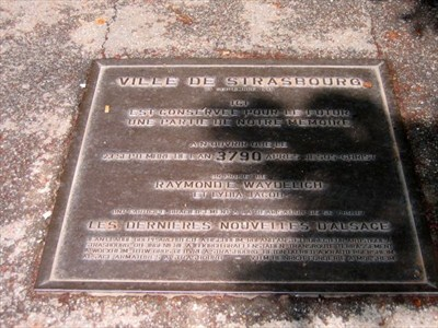 Capsule temporelle au centre de Strasbourg / Place de la Cathédrale